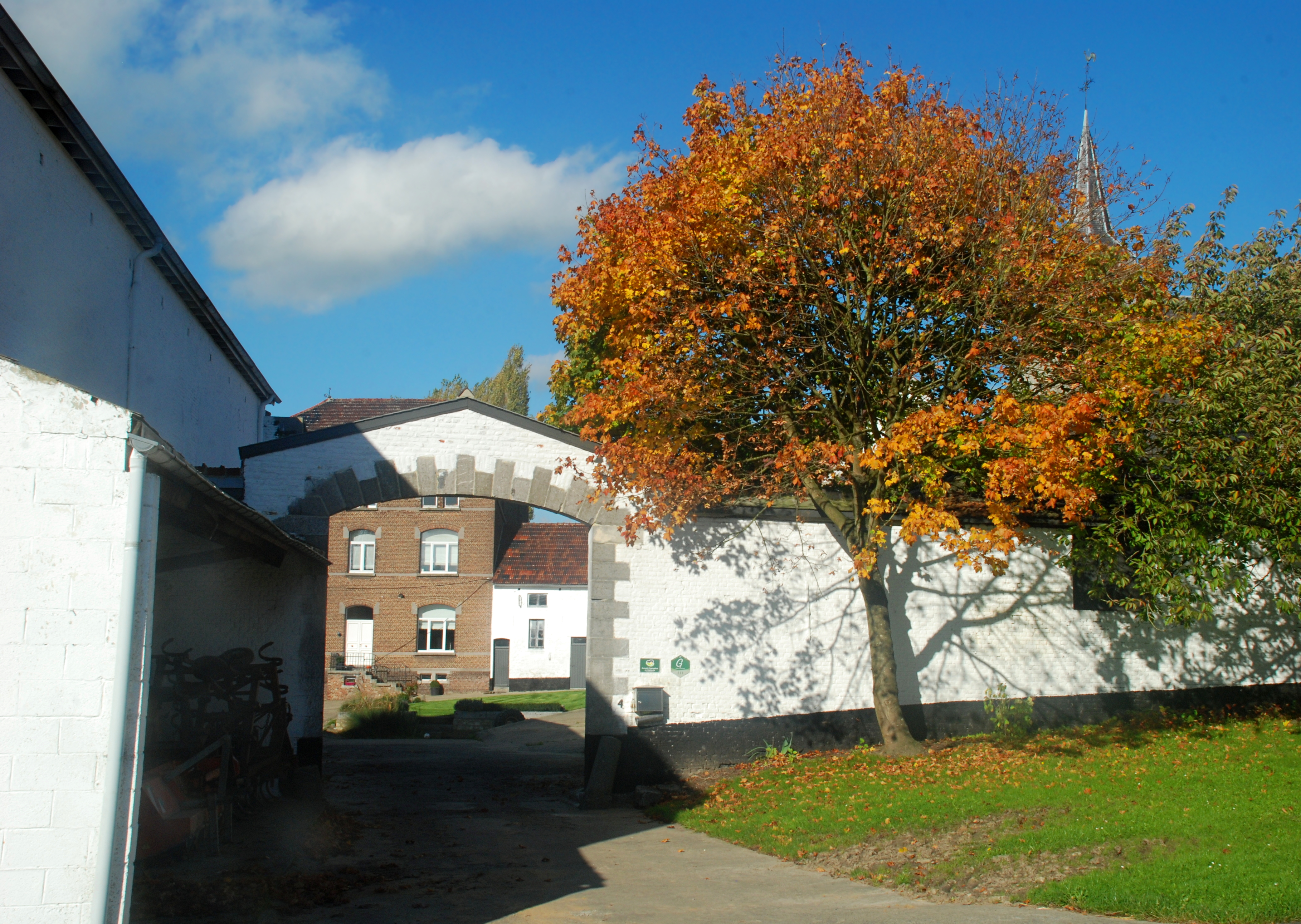 Belgique - Brabant wallon - Nivelles - Thines - ferme située en face de l'église Sainte-Marguerite